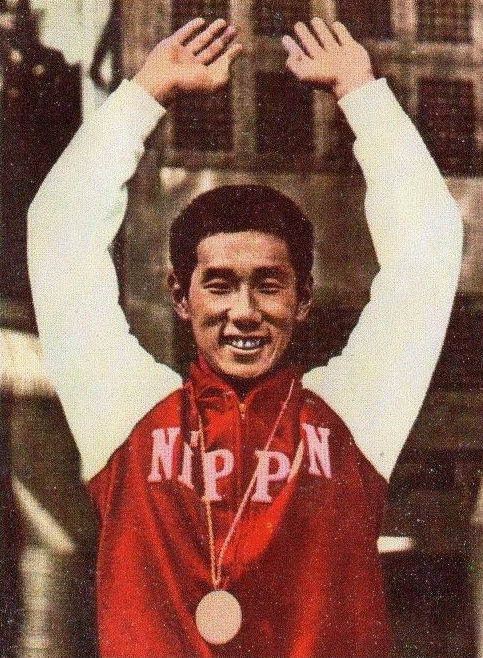 CAMPIONI dello SPORT 1969/70-n.274- MEYER - USA - NUOTO